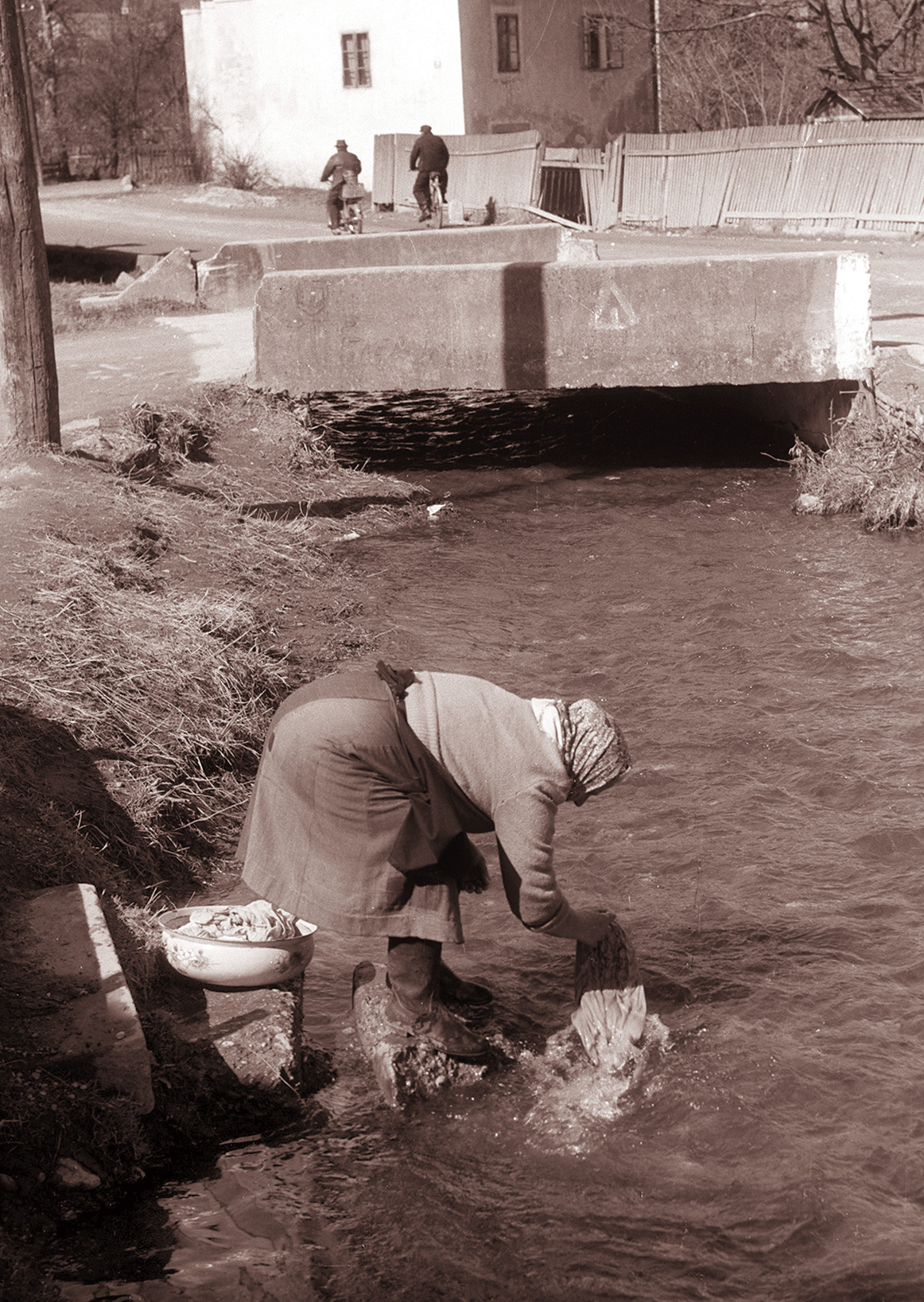 Perica v Hočah.